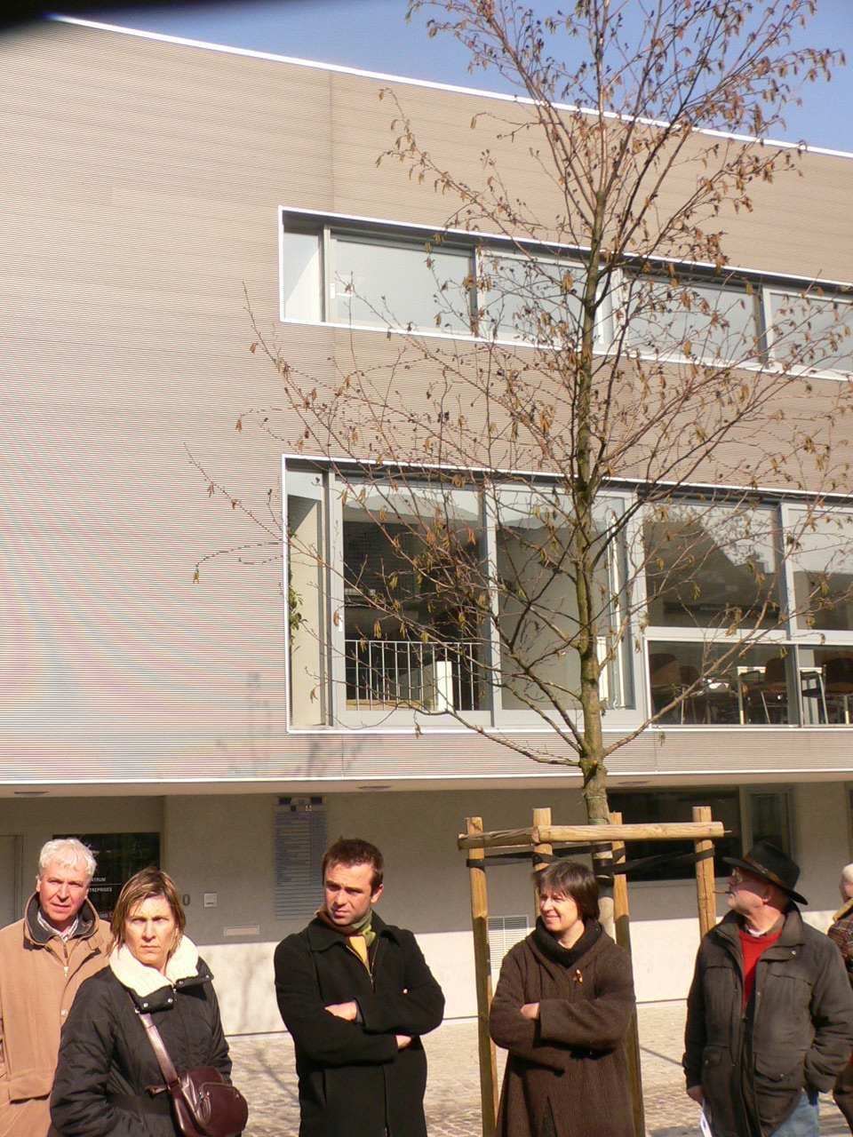 Centre dynamique d'entreprise de Molenbeek, Crédit phographique Mario Scolas